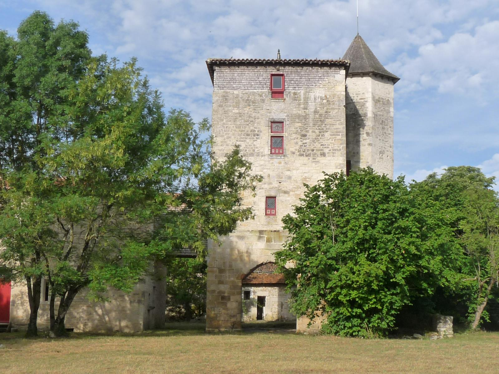 Château de Sigogne, Coulgens, Charente, France